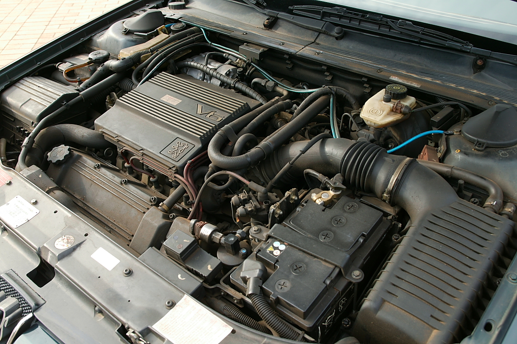 Peugeot 605 V6 12V petrol engine